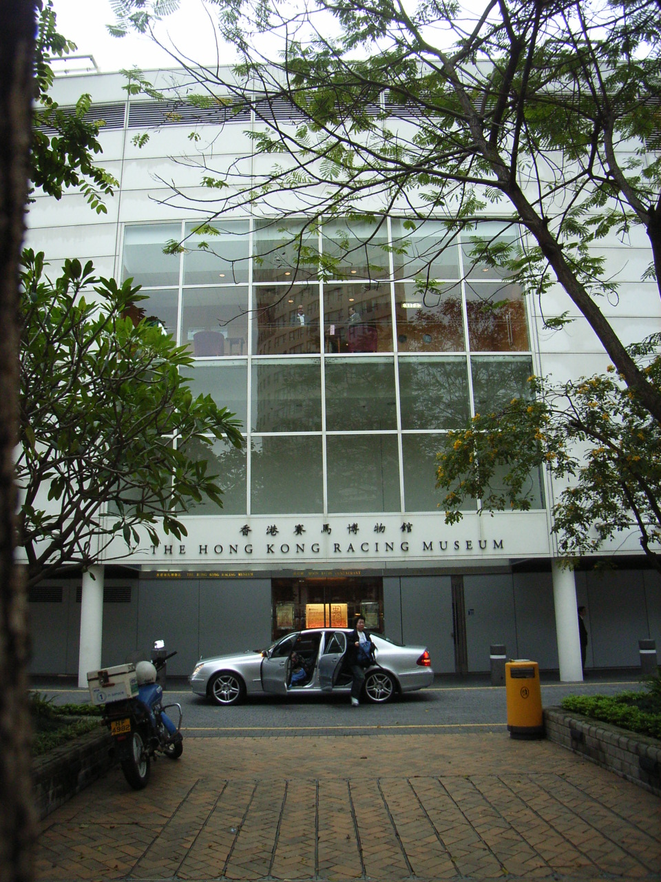 香港賽馬博物館 Hong Kong Racing Museum, Happy Valley, HK